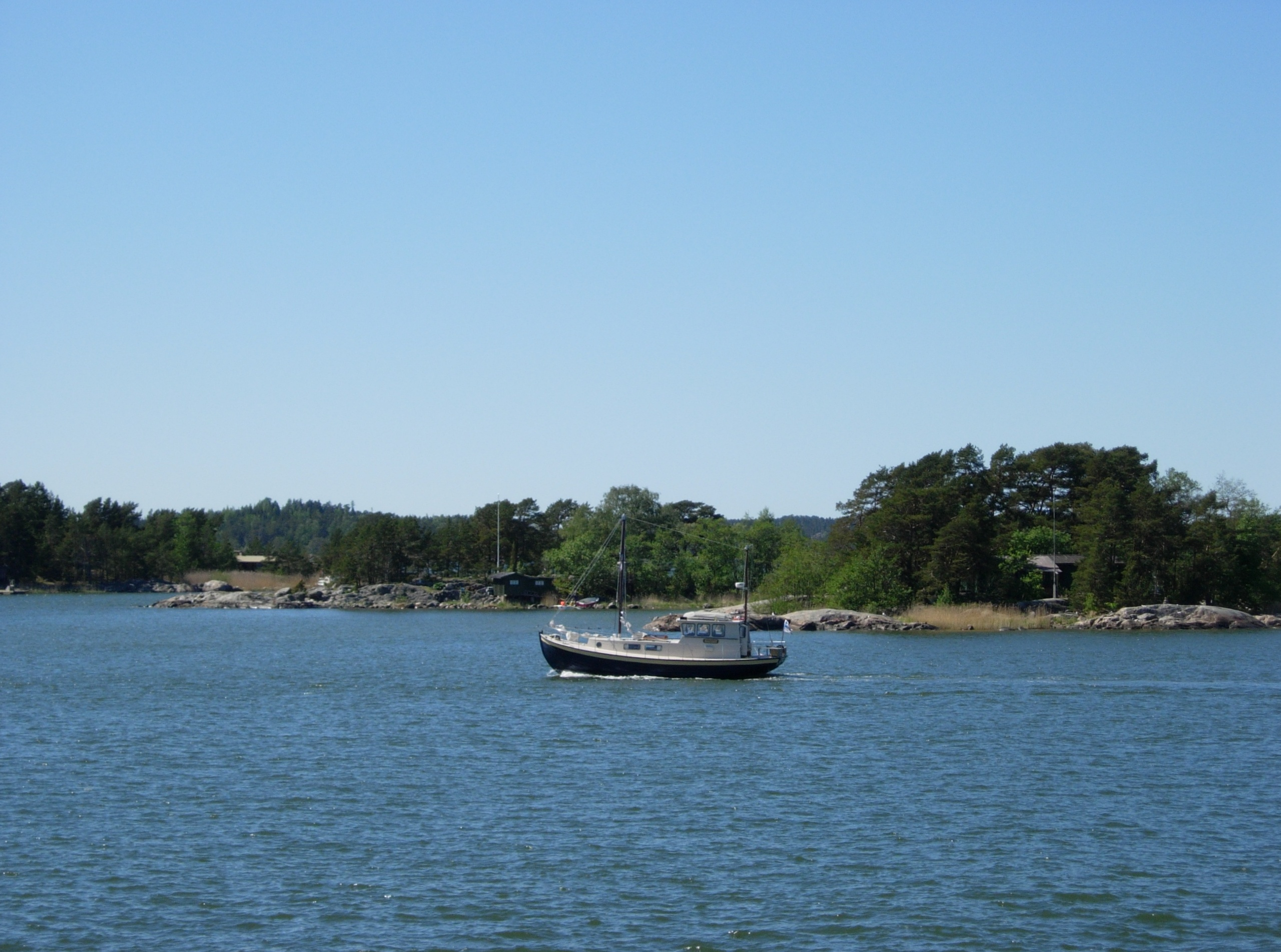 Kraakkukari (oik.), Mäntykari (kesk.) ja Pitkäkari (vas.) Rymättylässä. Kuva otettu Vepsän lounaisen niemen kärjestä lähes suoraan länteen.